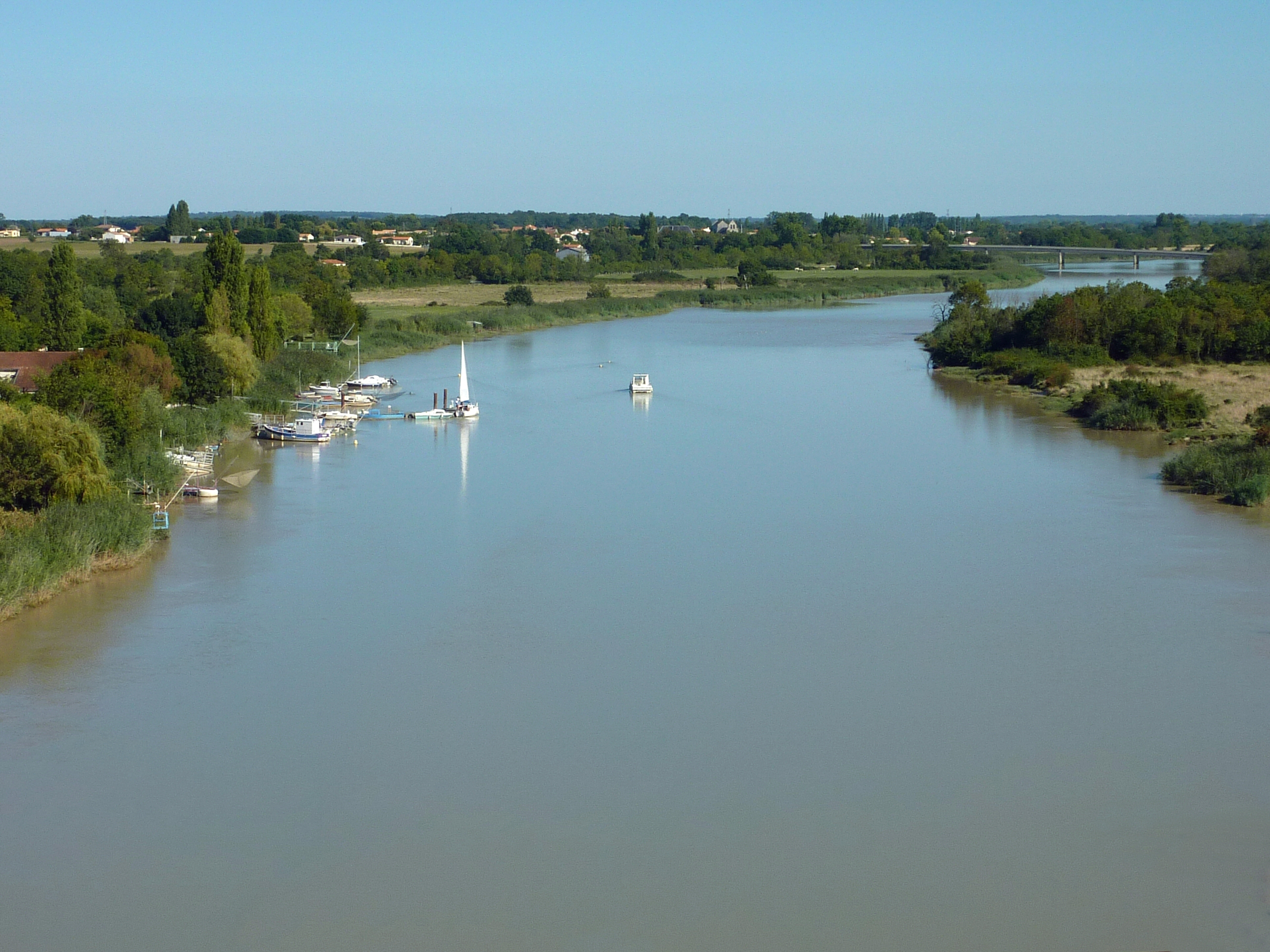 La Charente et le pont de Saint-Clément Tonnay Charente Charente-Maritime France